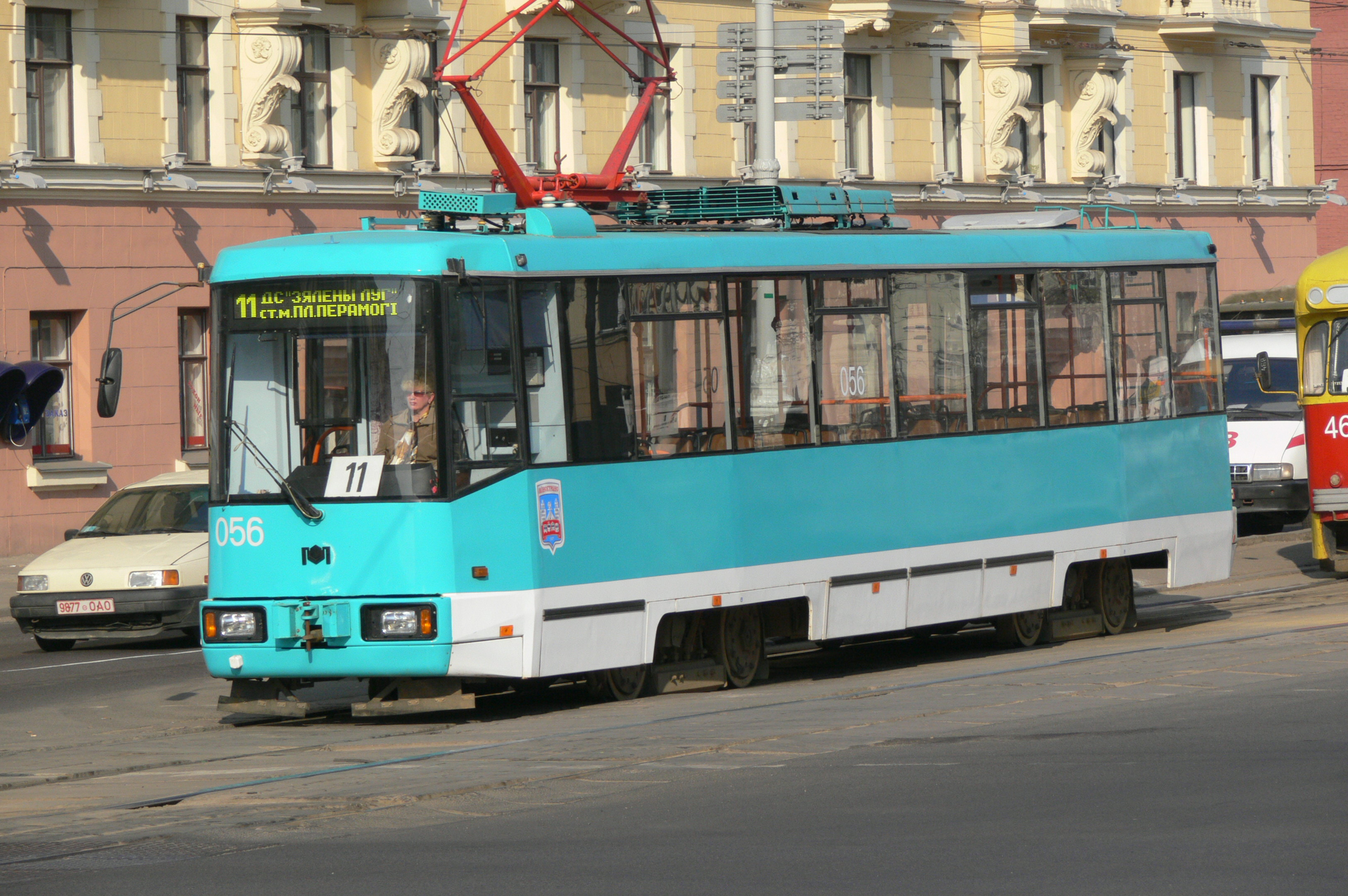 Belarusian tram AKCM-60102 in Minsk